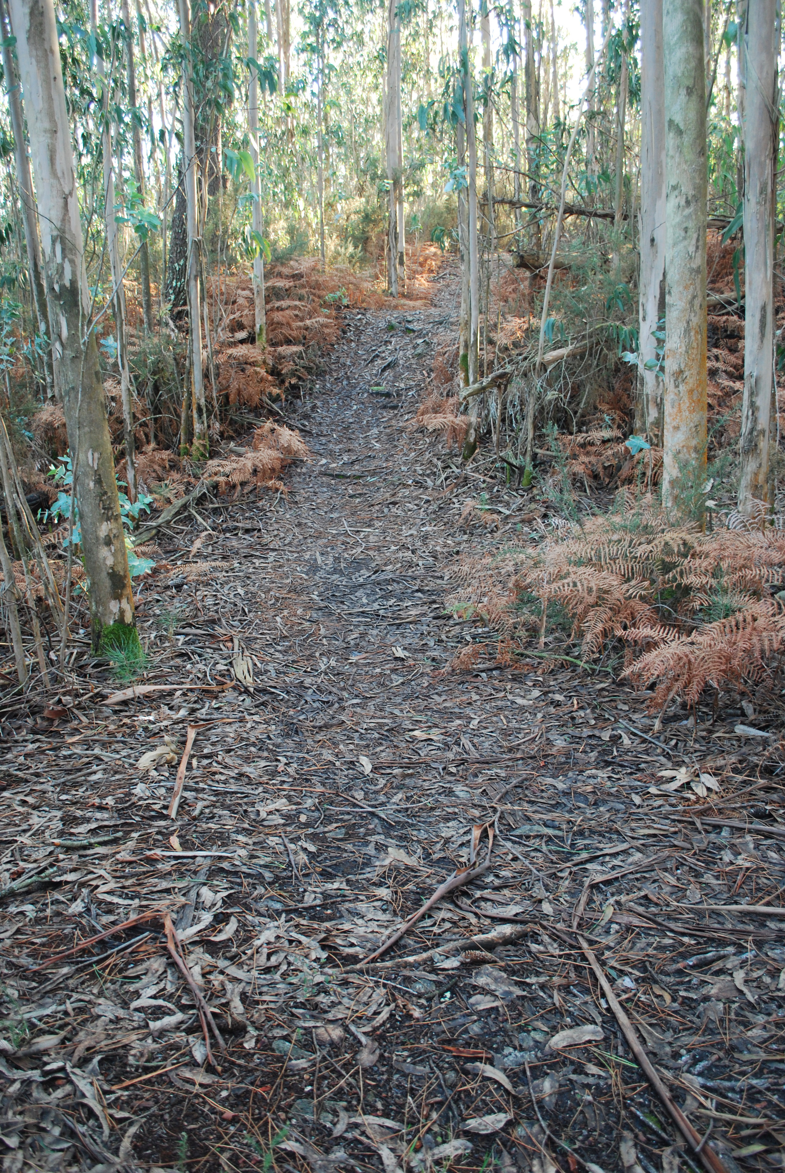 Vista das defensas do castro de pereiroa Sedes Narón A Coruña Galiza